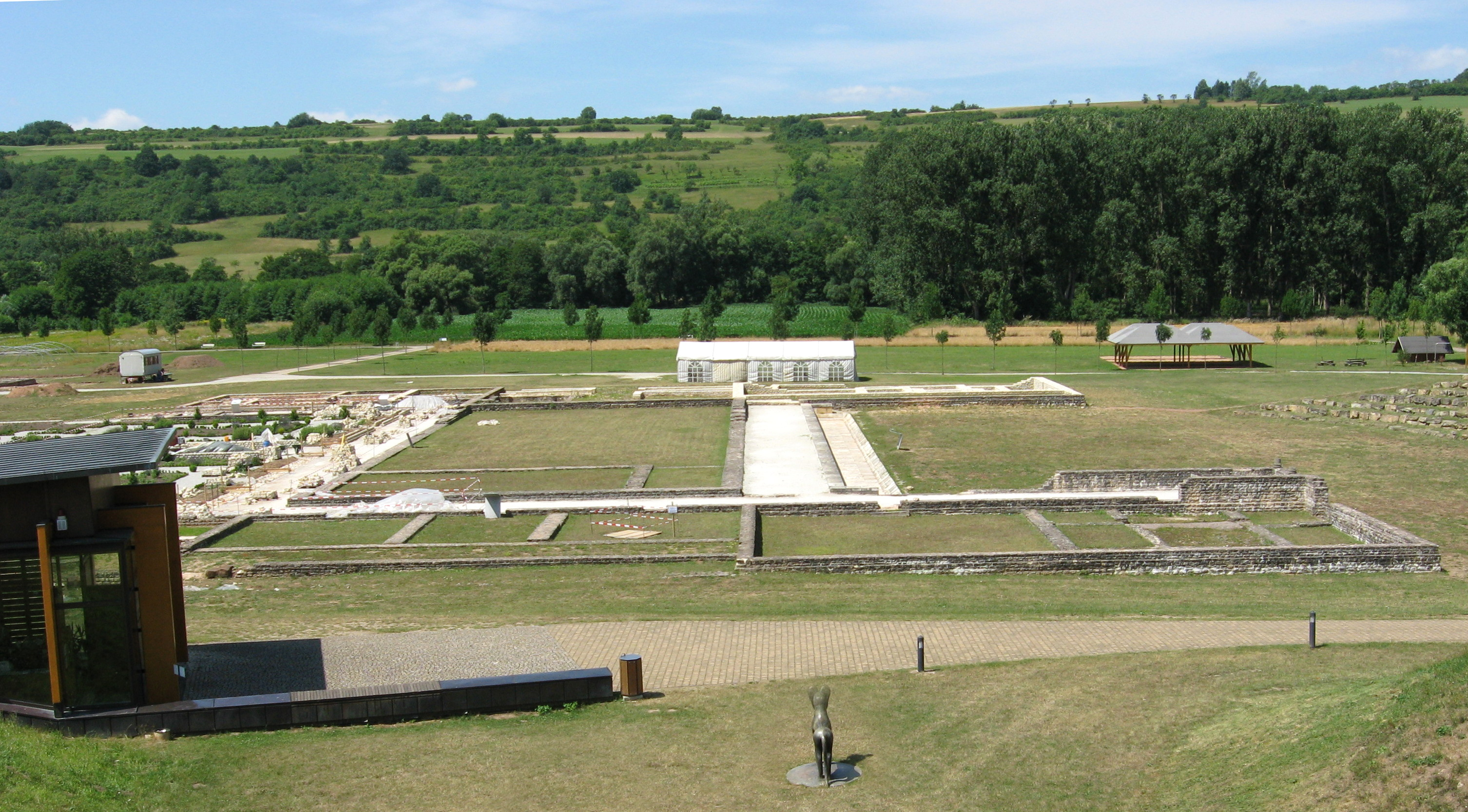 Grabungen in Reinheim